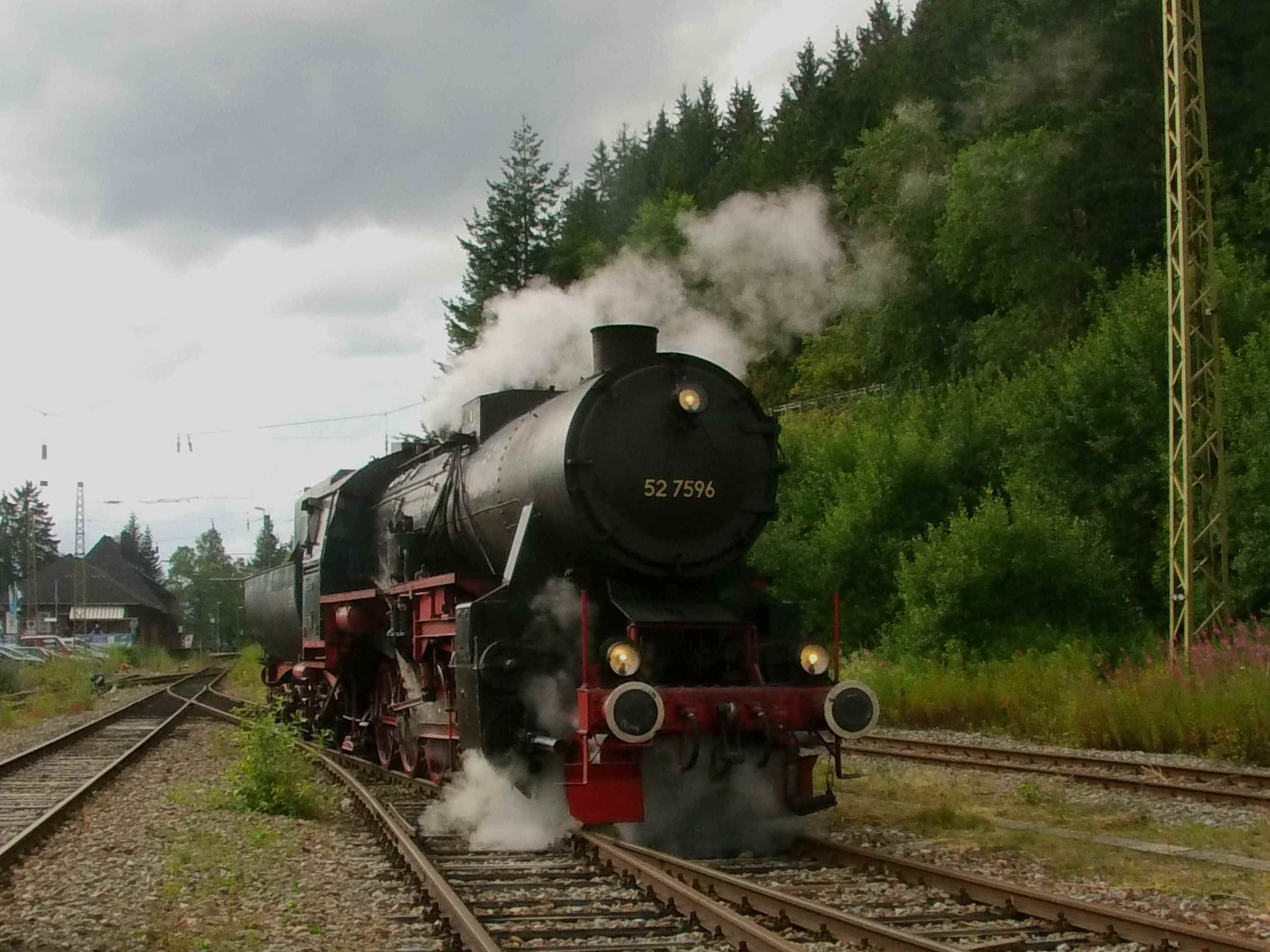 EFZ-Lok 52 7596 beim Rangieren in Seebrugg, Sommerdampf 2012.